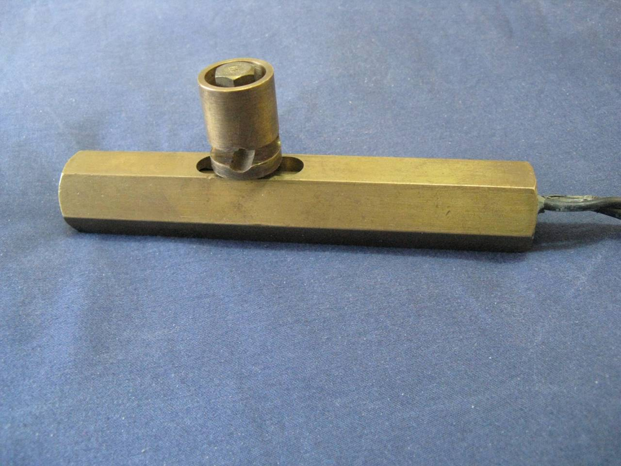 גדר המערכת